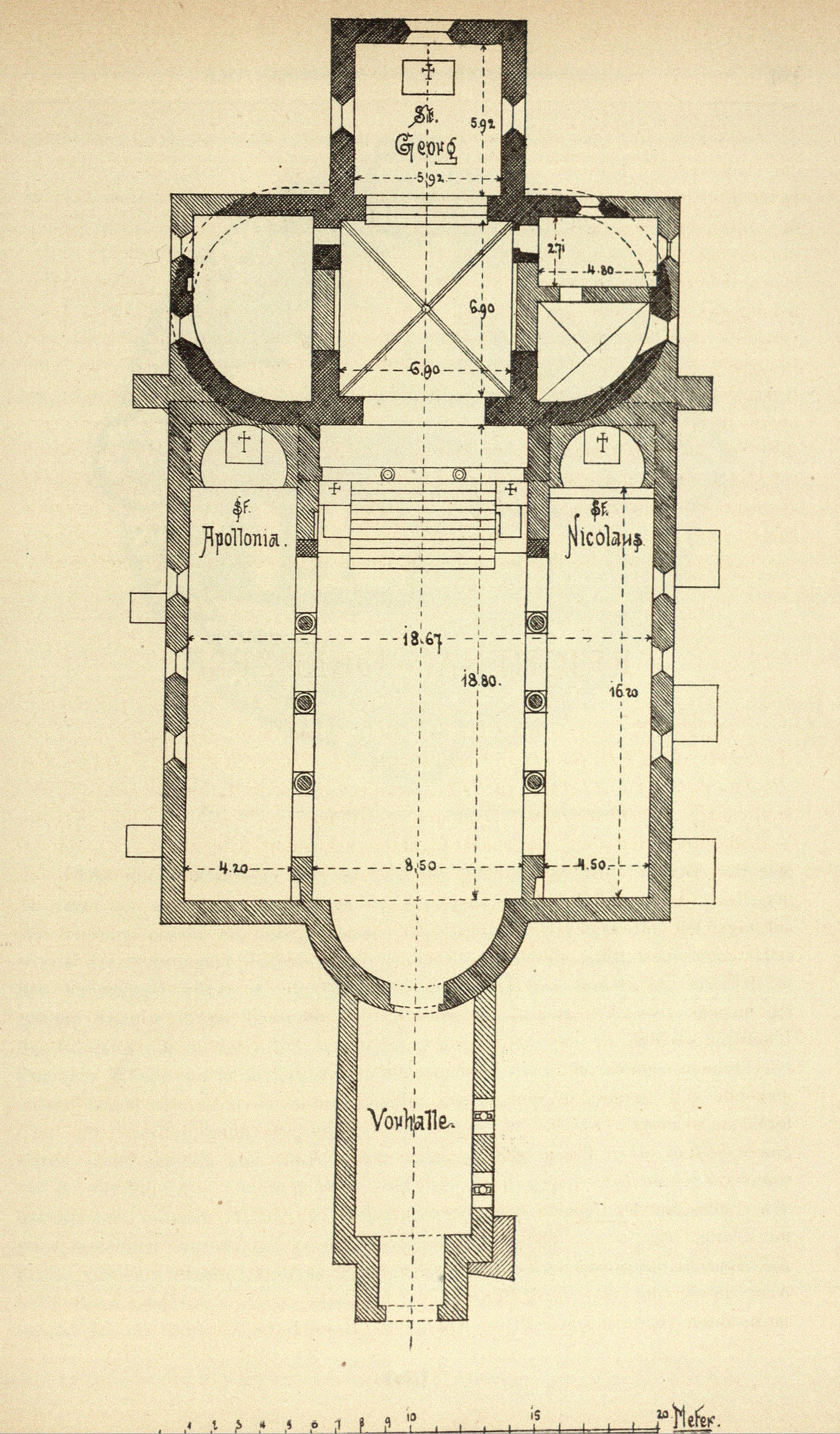 Reichenau, Stiftskirche St. Georg Oberzell, Grundriss Abbildung aus: Franz Xaver Kraus: Die Kunstdenkmäler des Grossherzogthums Baden. Band 1: Die Kunstdenkmäler des Kreises Konstanz. Freiburg i. Br. 1887